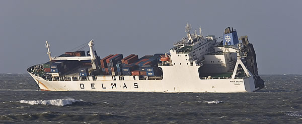 Le porte container "Rokia Delmas" le 24/10/2006, matin de son échouement au Bois-Plage sur la côte sud de l'Île de Ré - Charente-Maritime - France. IMO 8315190